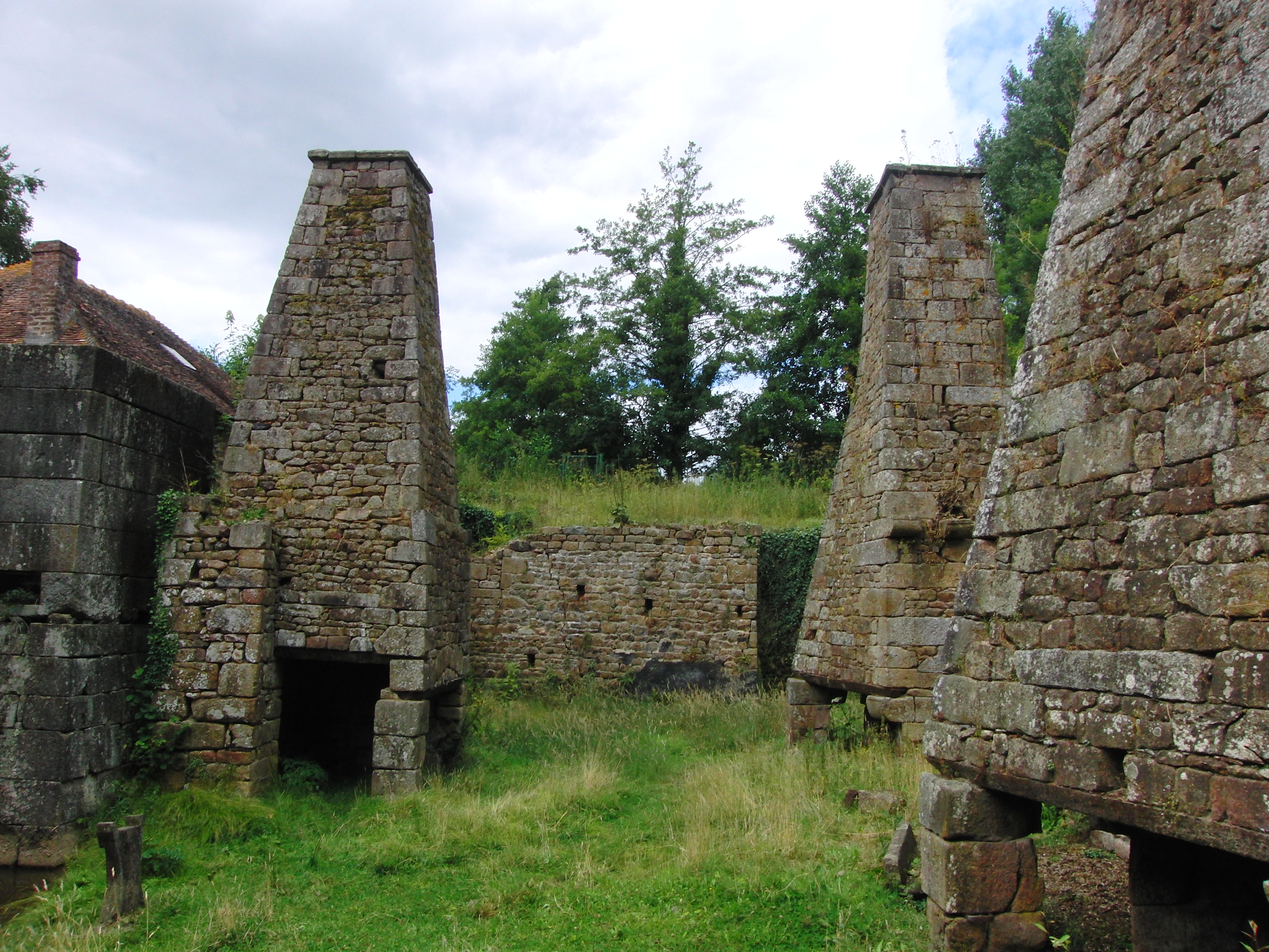 Les Forges de Varennes à Champsecret, Orne, France .